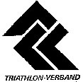 Logo des TV der DDR